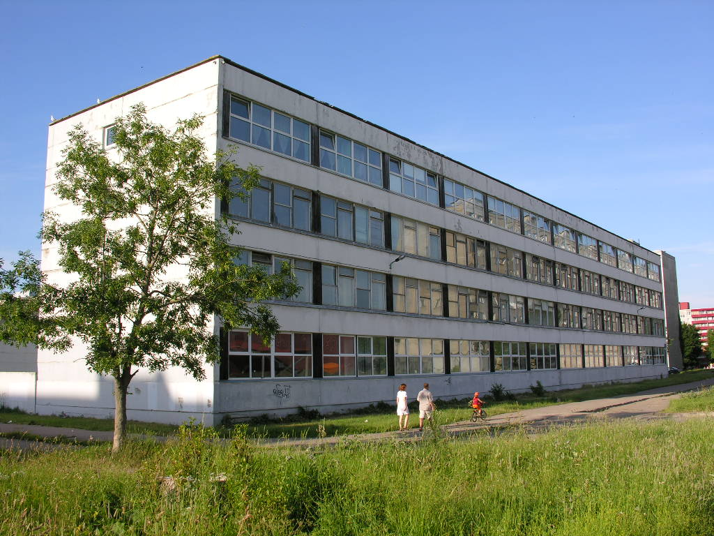 Гимназия Паэкааре (Таллин)